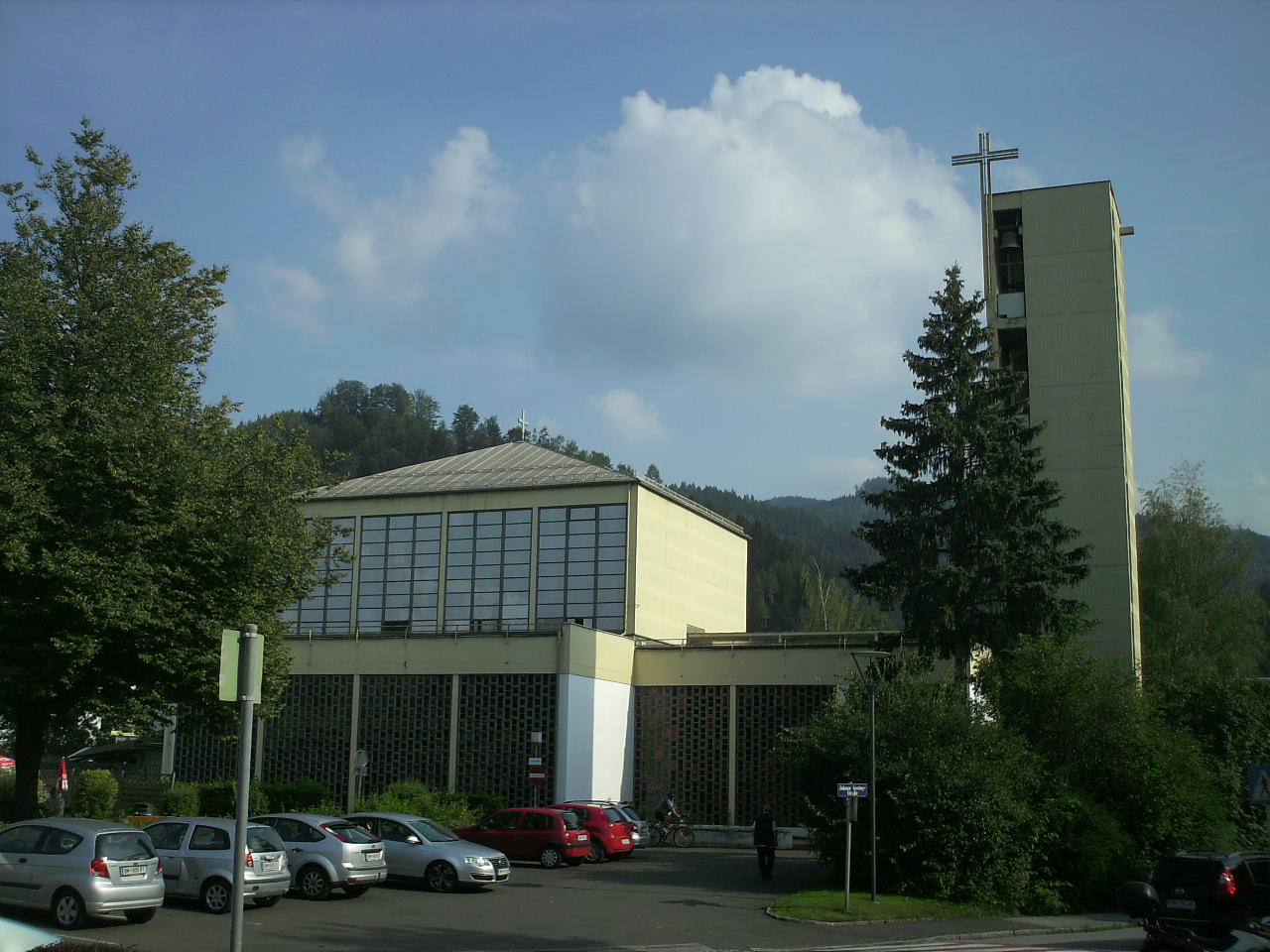 Kath. Pfarrkirche zur Hl. Familie in Walfersam, Kapfenberg/Österreich